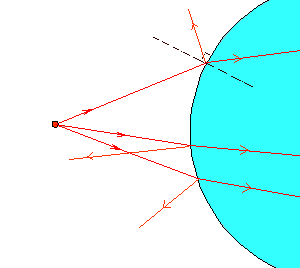 Schéma : lois de Descartes sur dioptre courbe (schéma personnel) Catégorie:Schéma de physique